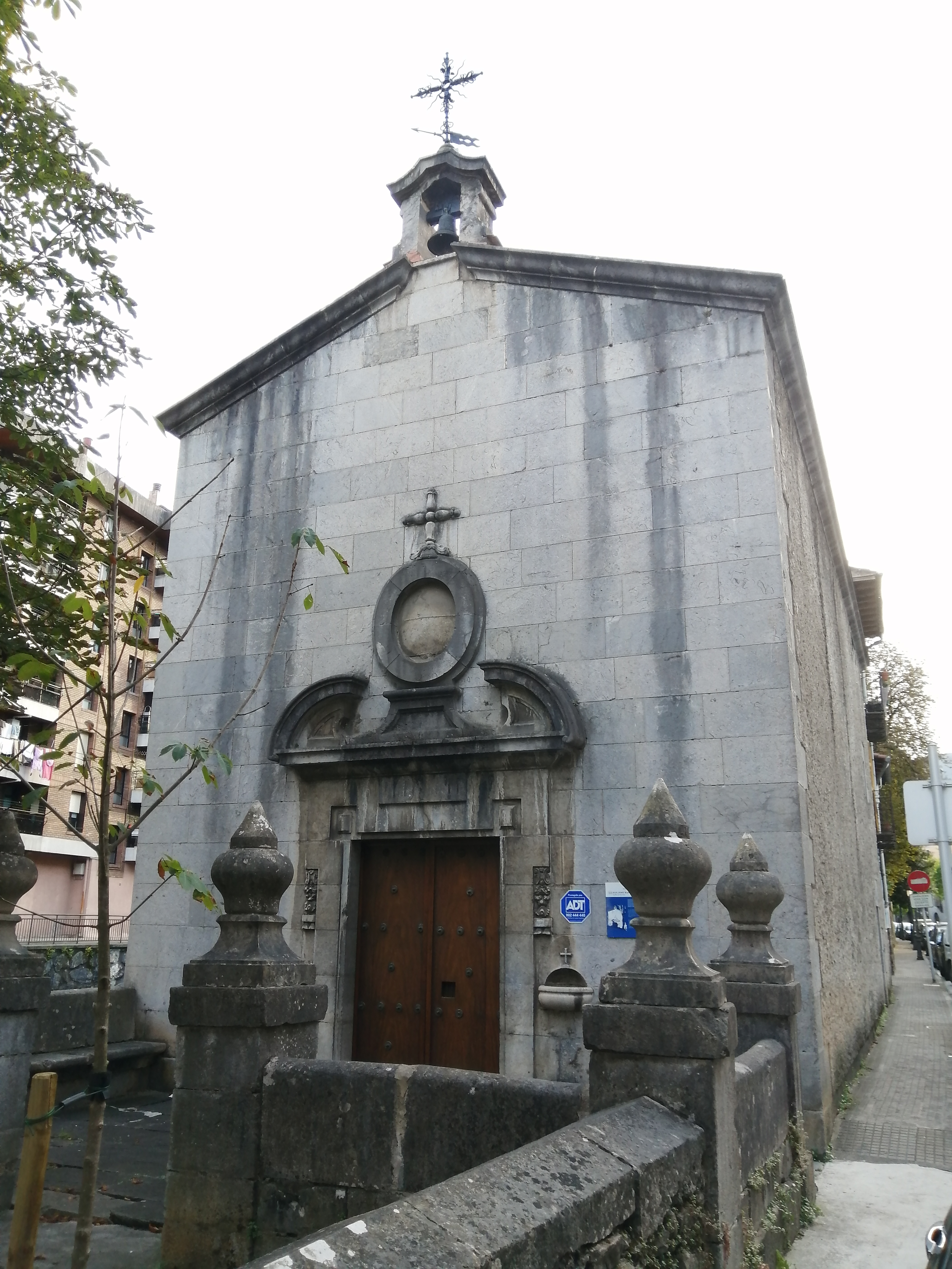 San Jose ermita Azkoitian